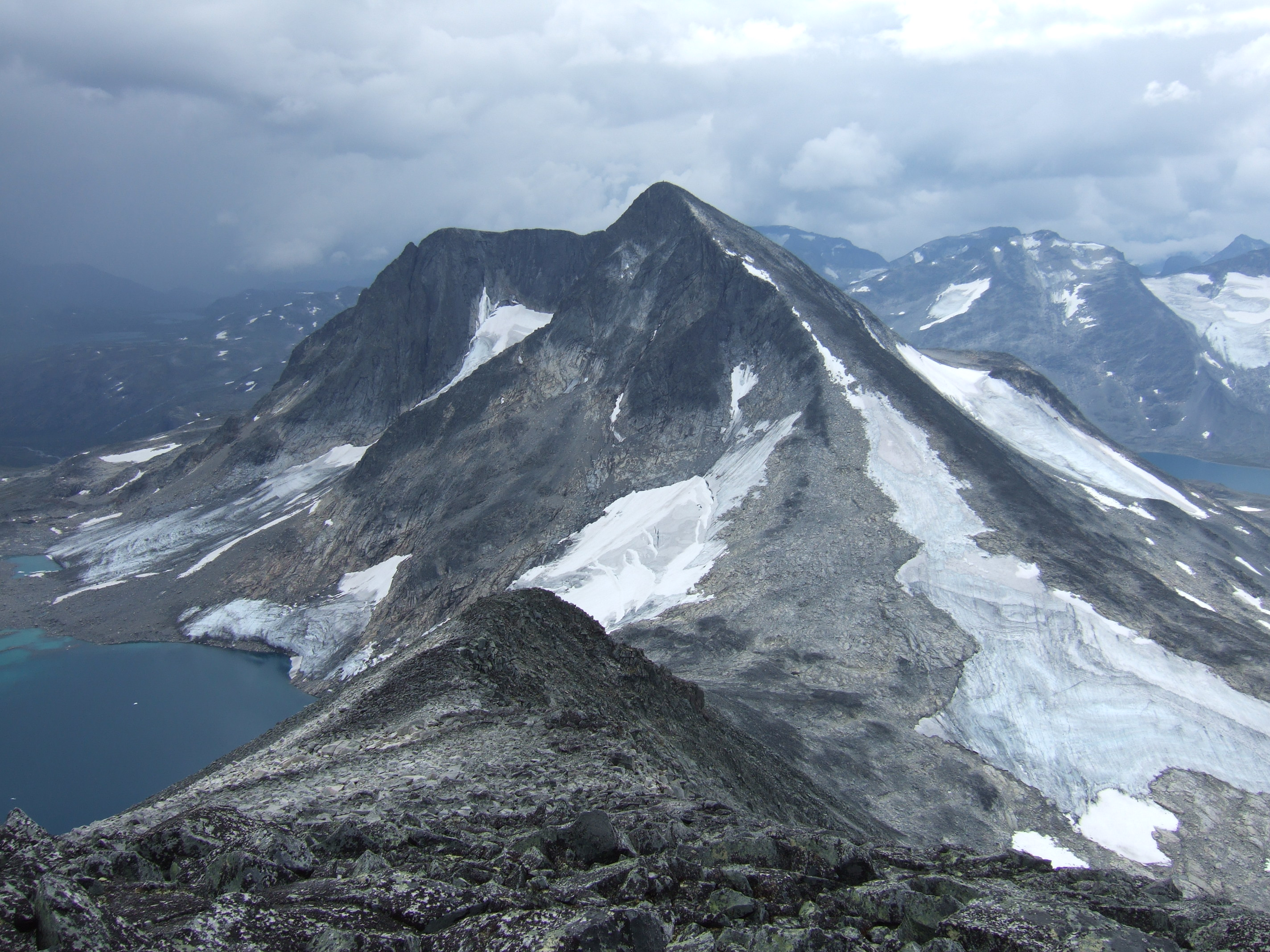 Semeltinden sett fra Søre Hellestugutinden, Jotunheimen.